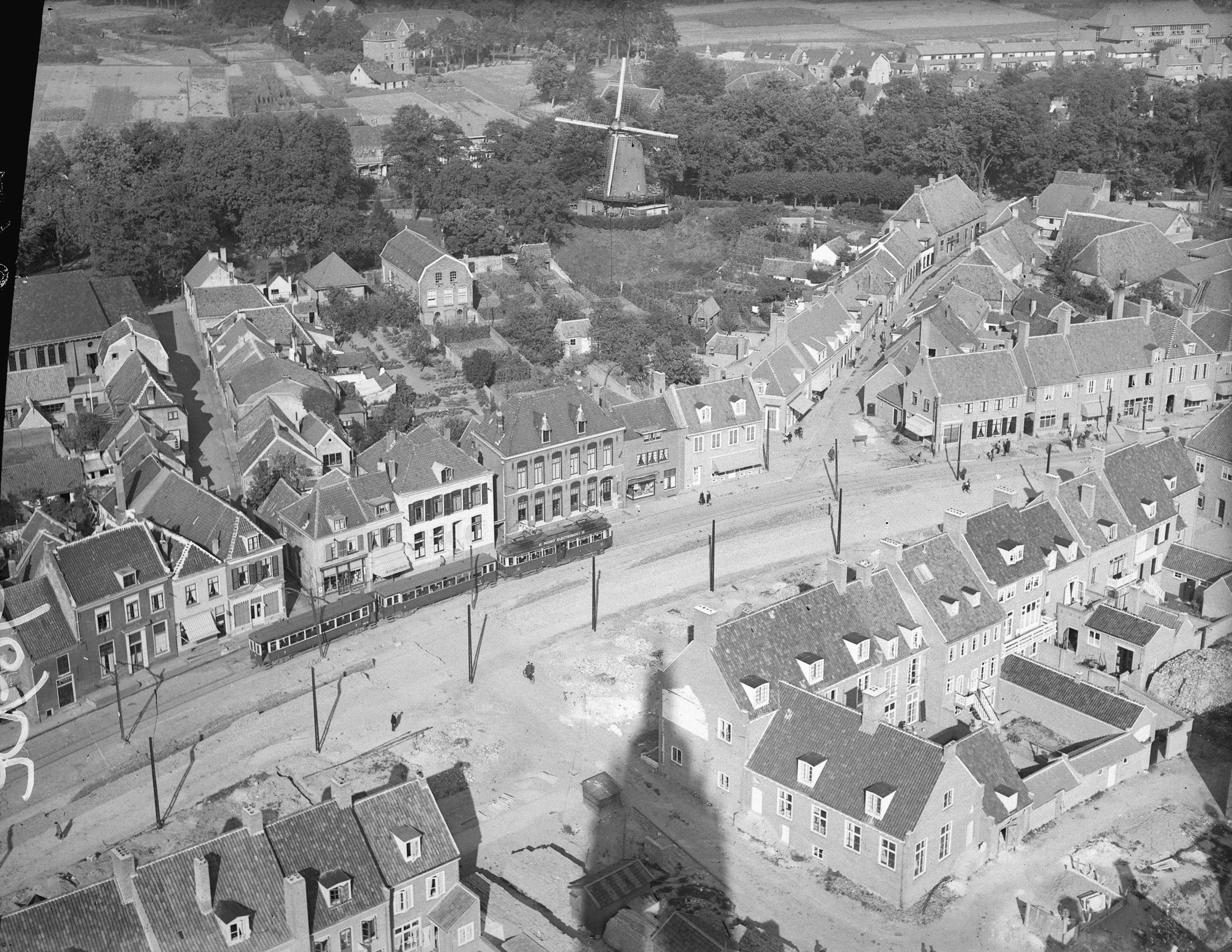 Molen / Tram: overzicht gezien in de noord oostelijke richting vanaf Cuneratoren, na wederopbouw van oorlogsschade uit 1940